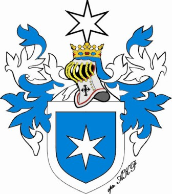 Herb szlachecki rodziny von Goethe (opr. AK-P)